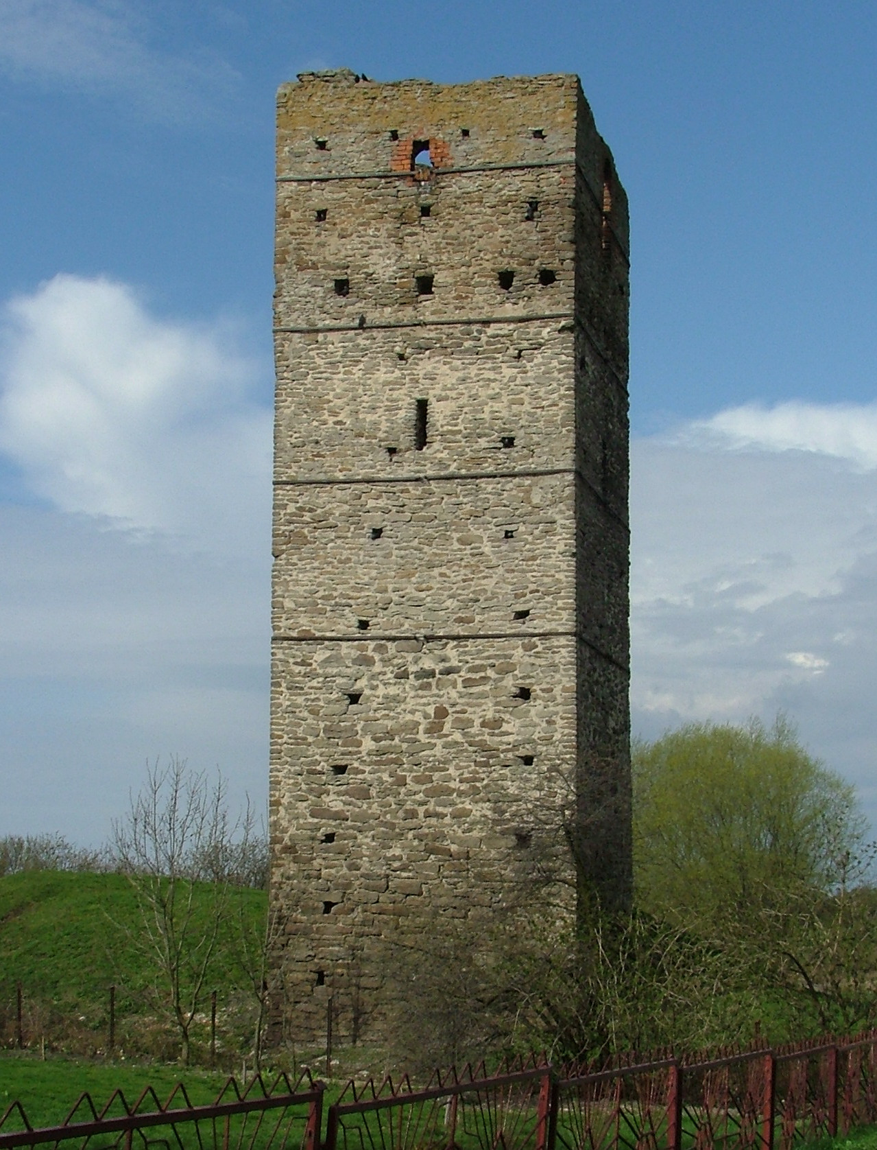 Stołpie, woj. lubelskie, wieża